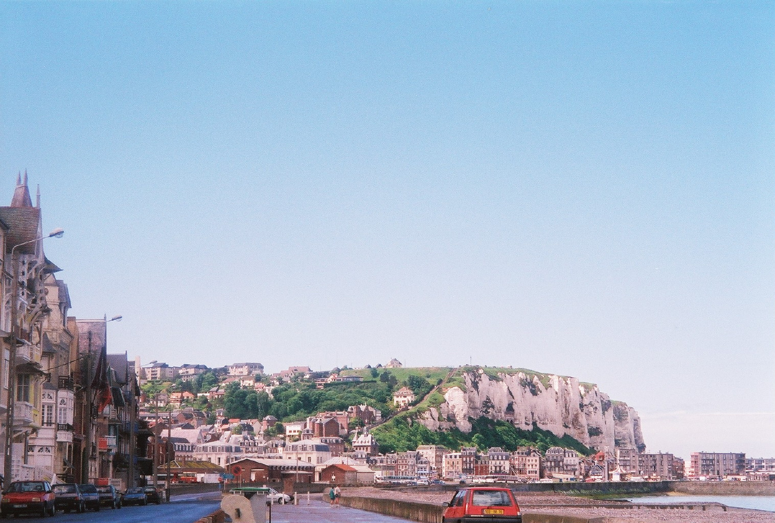 Le Tréport